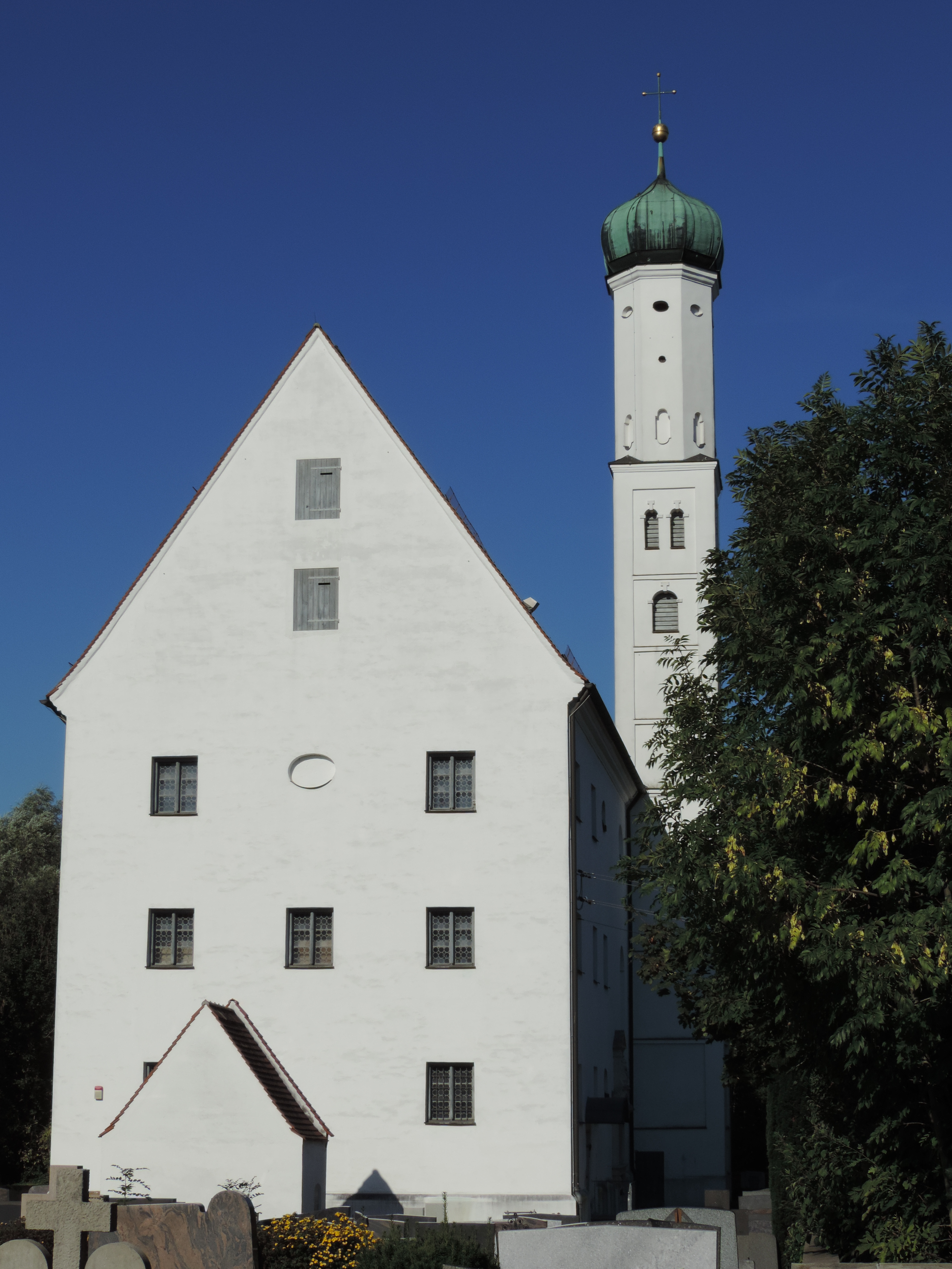 Friedhofsansicht